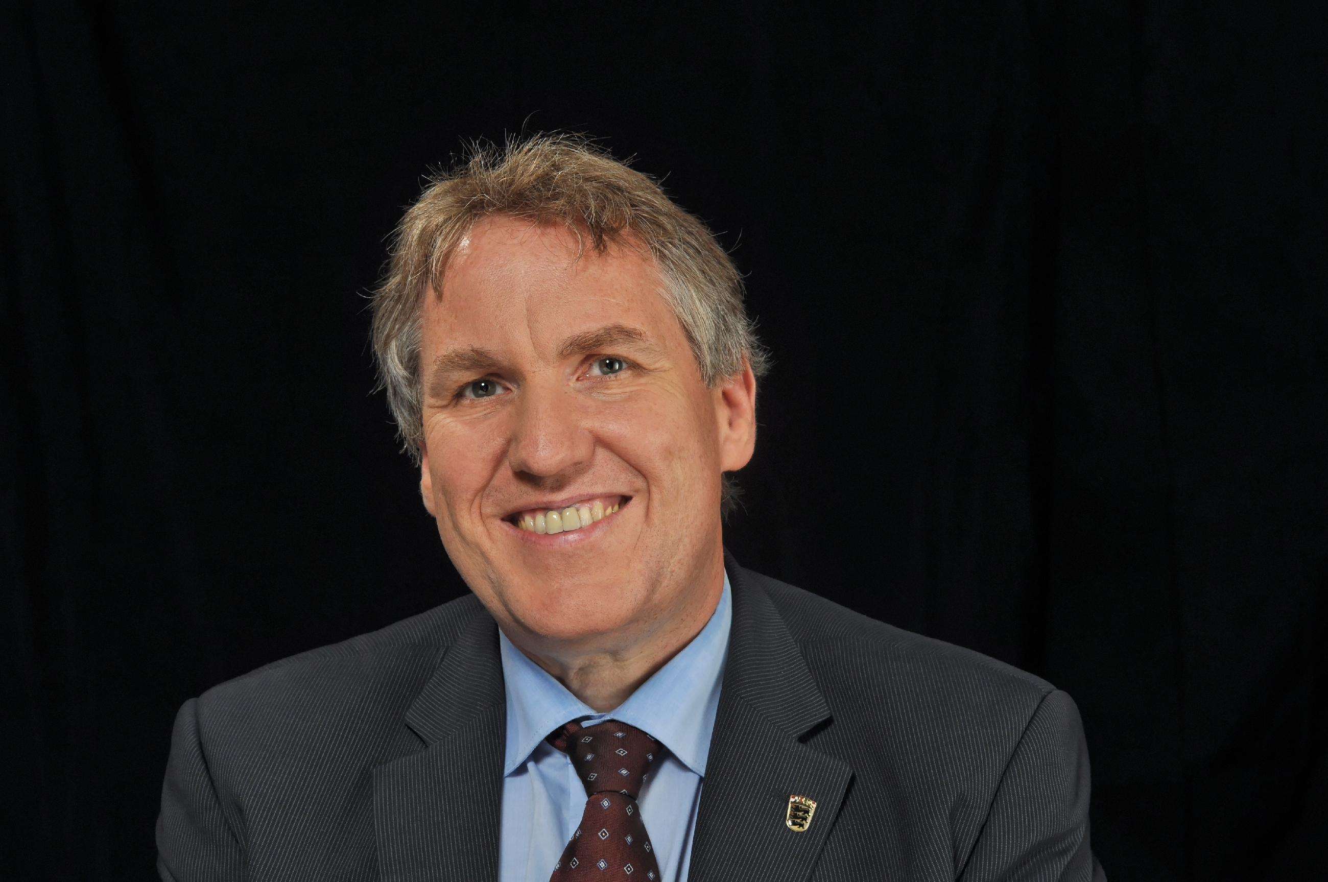 Thaddäus Kunzmann 2013 Personality rights warning Although this work is freely licensed or in the public domain, the person(s) shown may have rights that legally restrict certain re-uses unless those depicted consent to such uses. In these cases, a model release or other evidence of consent could protect you from infringement claims.